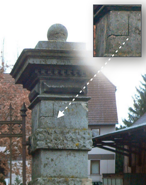 Vierung an ehemaligen Pfeiler von Schloss Salzdahlum